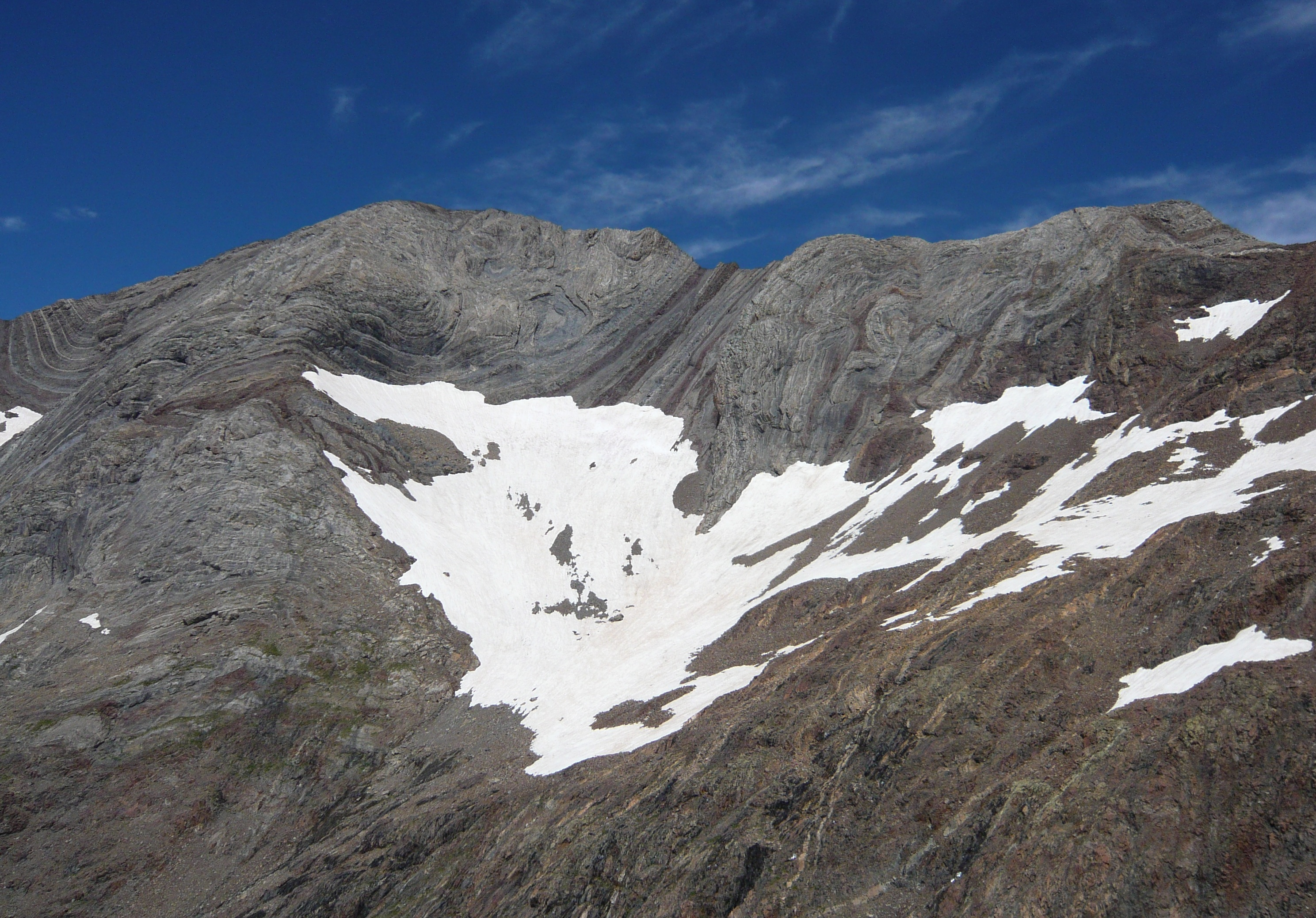 Pic d'Espadas, vu depuis la voie normale du Pic des Posets.